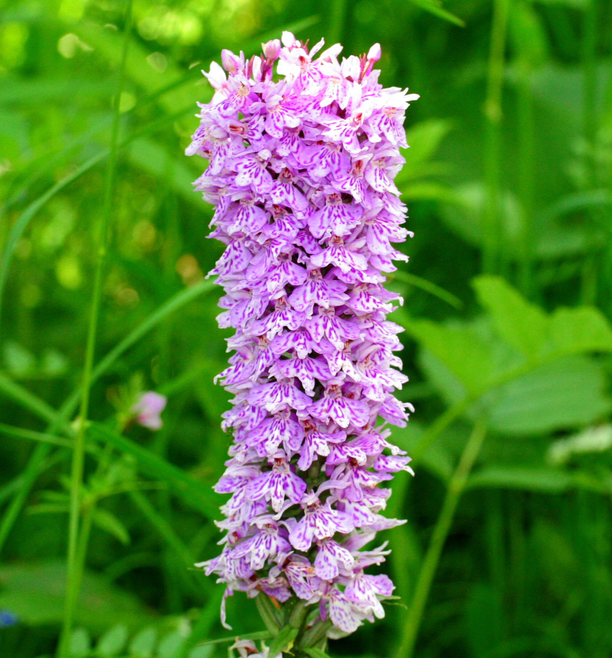 Orchis di Fuchs - Località: Giardino Botanico Alpino "Giangio Lorenzoni", Pian Cansiglio, Tambre d'Alpago (BL), 1000 m s.l.m.